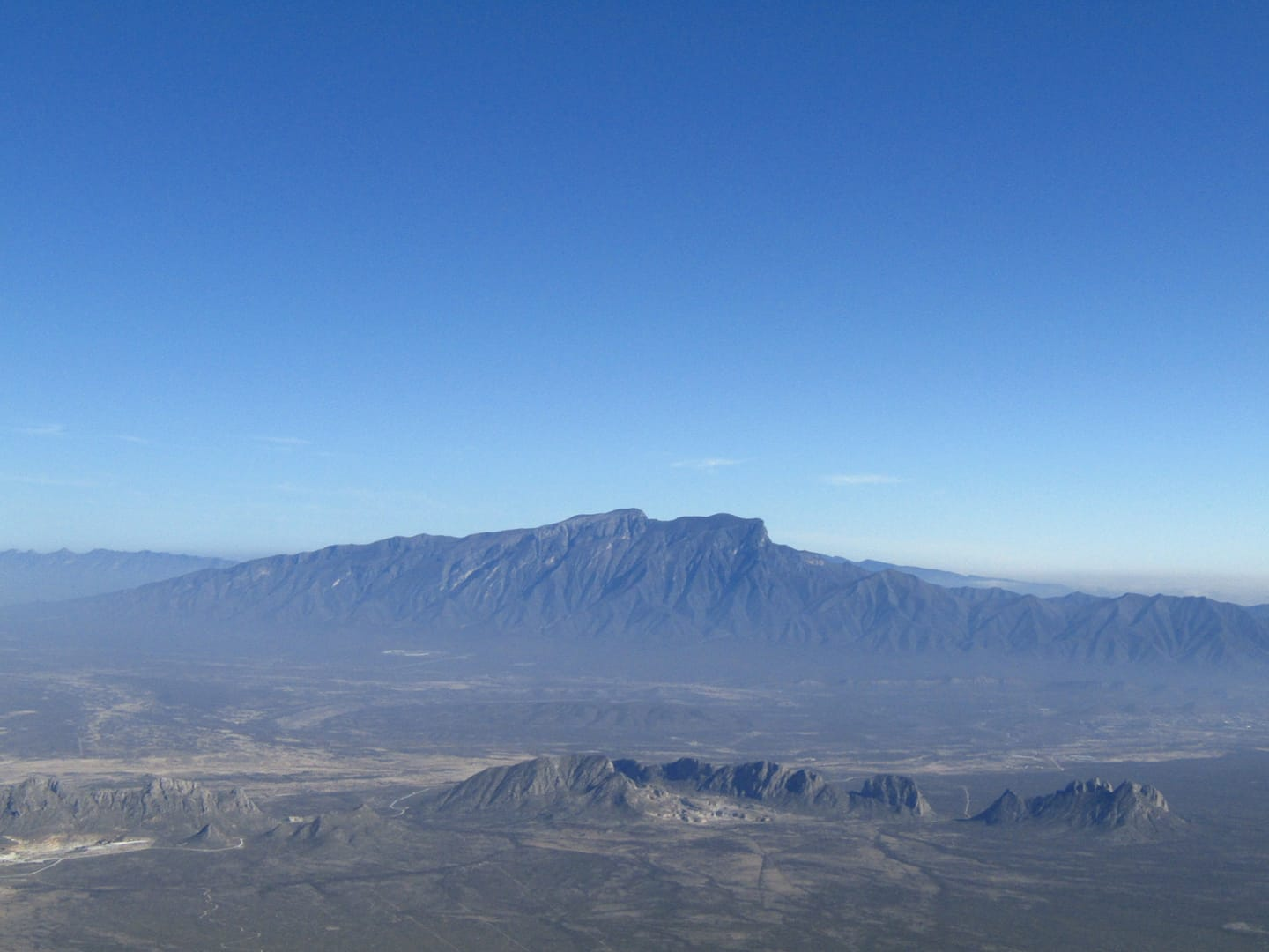 Cerro Tía Chena, una montaña semidesértica